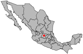 Locator map of Guanajuato, Guanajuato, Mexico